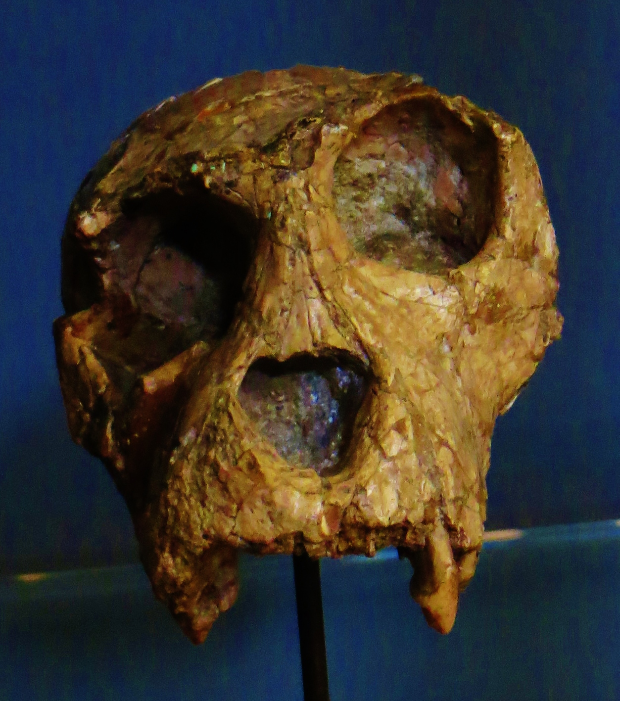 Fossil of Dolichopithecus, an extinct mammal- Took the photo at Musee d'Histoire Naturelle, Paris